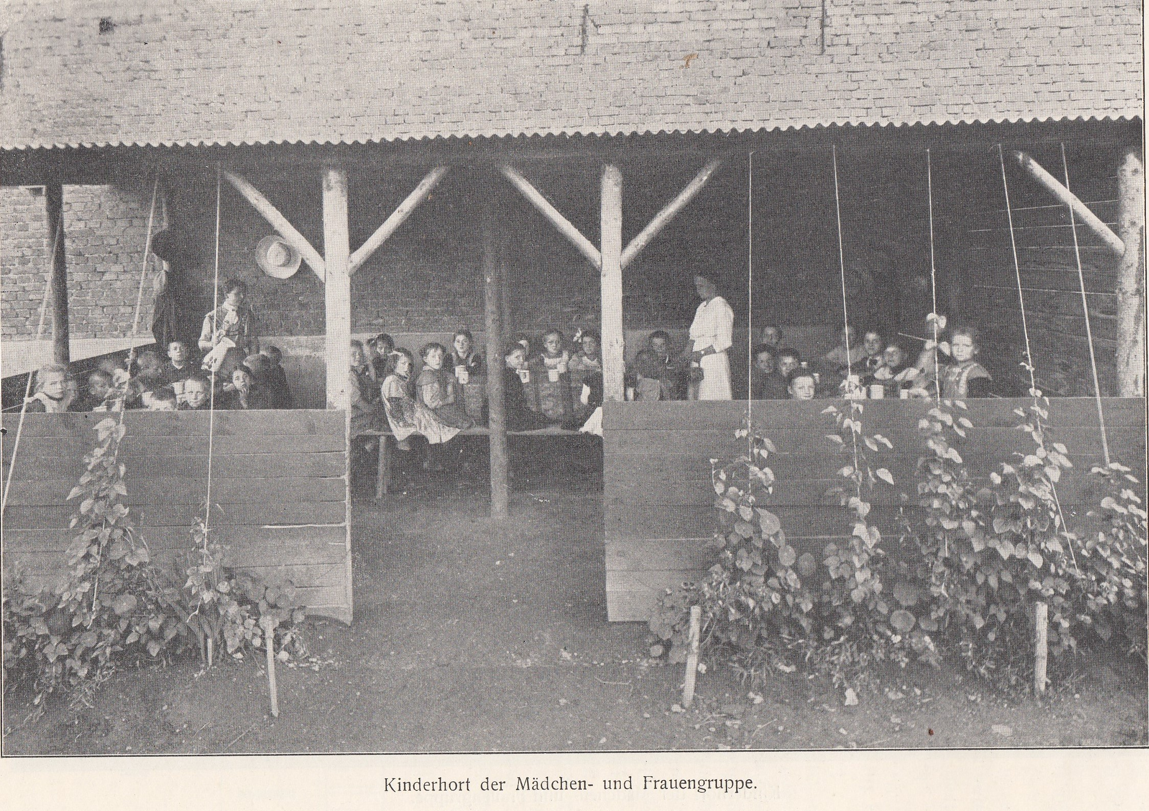 Mädchenhort der Sozialen Mädchen- und Frauengruppen